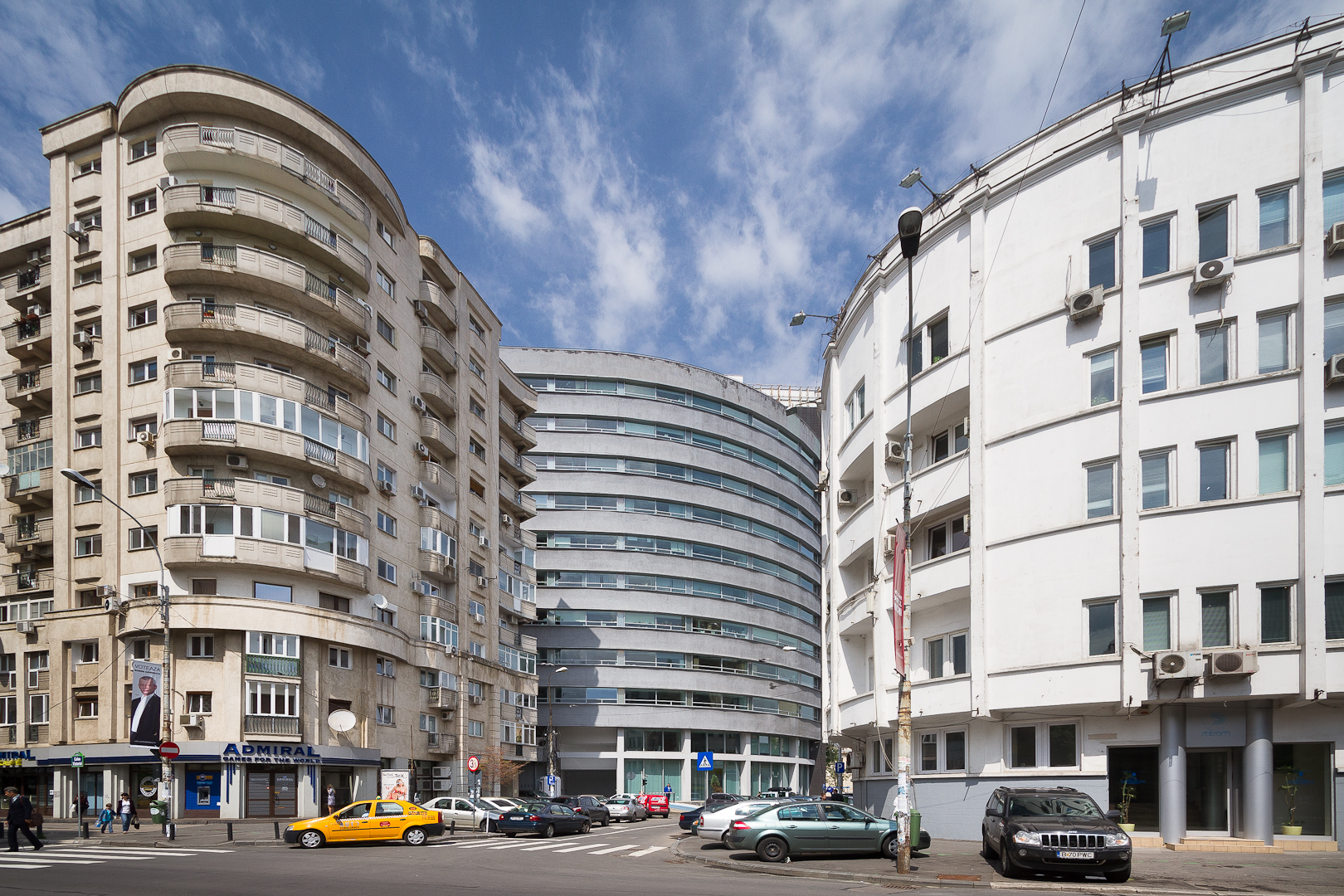 Blocuri - Calea Victoriei